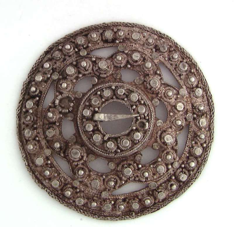 Slangesølje i sølv med filigran, fra Seljord i Telemark. Foto Anne-Lise Reinsfelt / Norsk Folkemuseum, NF.1994-0111.